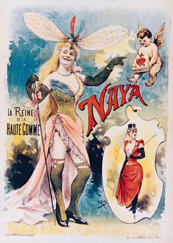 Naya, La reine de la haute gomme, Imprimerie Delanchy, não datado